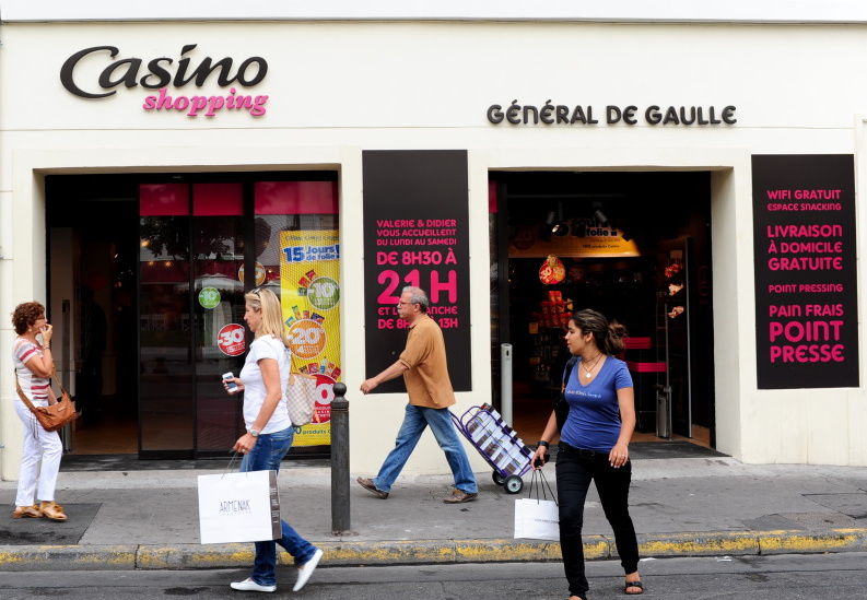 Magasin Casino Shopping